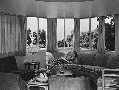 Anna Sten: in her Sten-Frenke House, 1930s, Richard Neutra project, residence in Santa Monica Canyon.